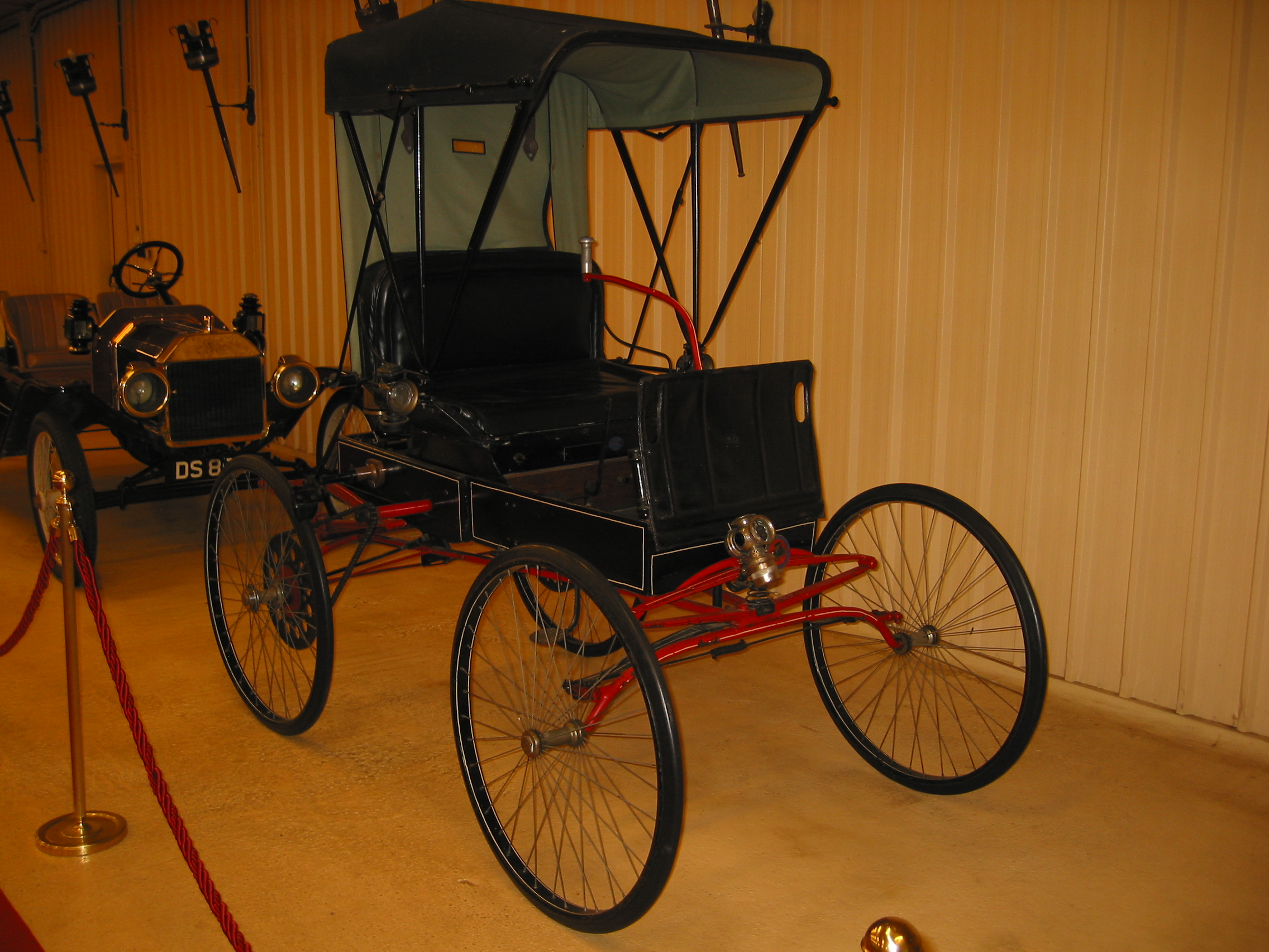 Allen 1898